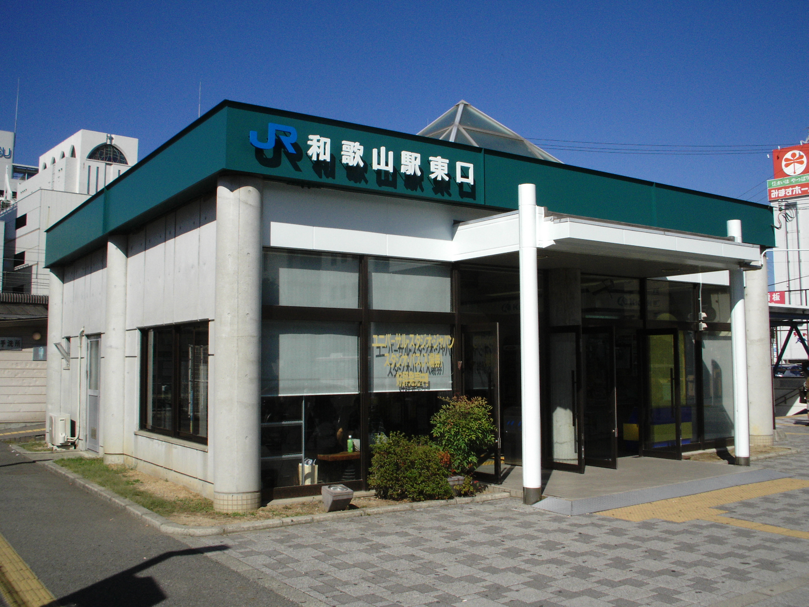 和歌山駅東口